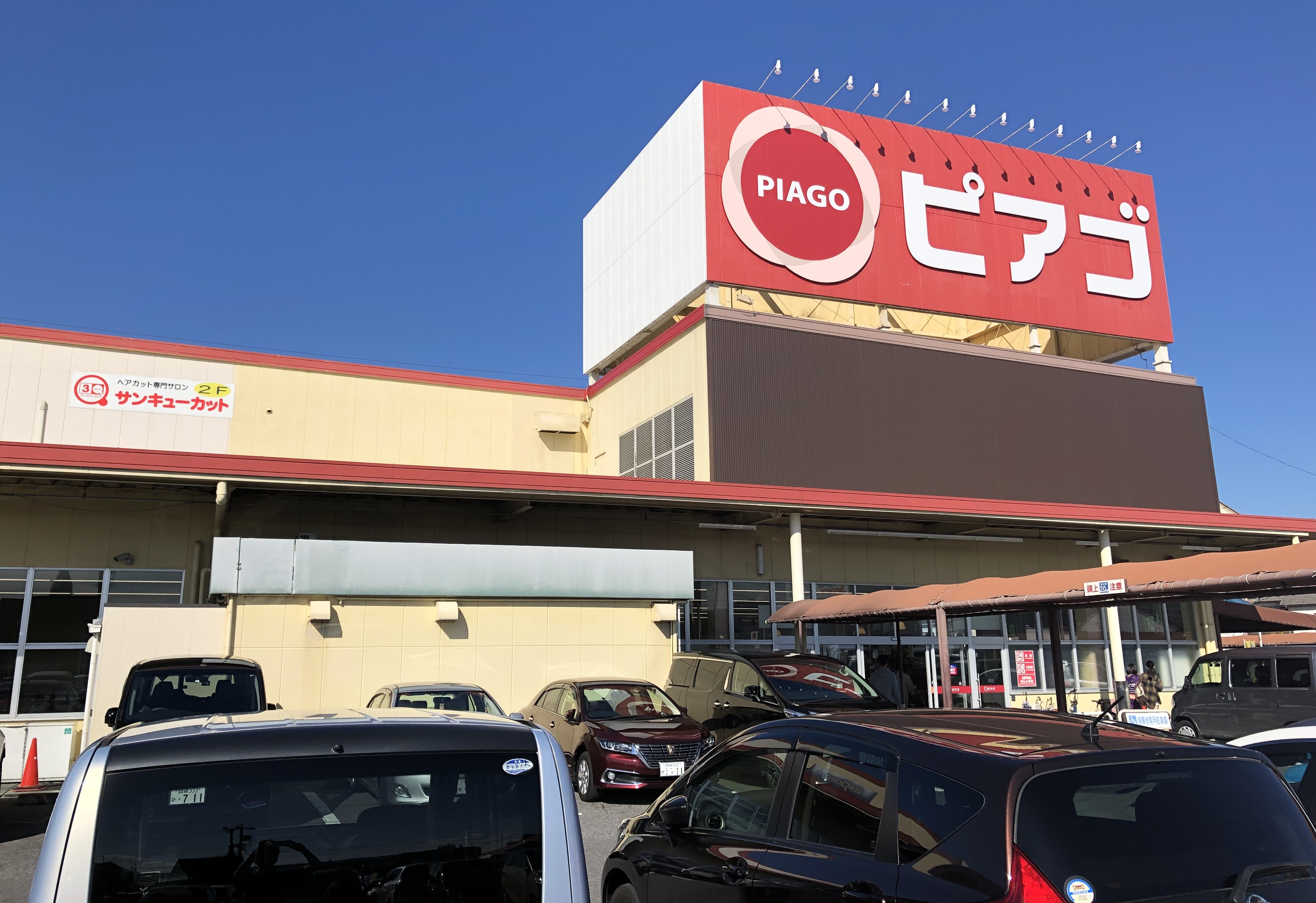 ピアゴ洞店（岡崎市洞町）